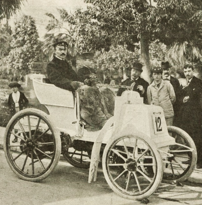 La Vie au Grand Air du 1er avril 1898, p.7